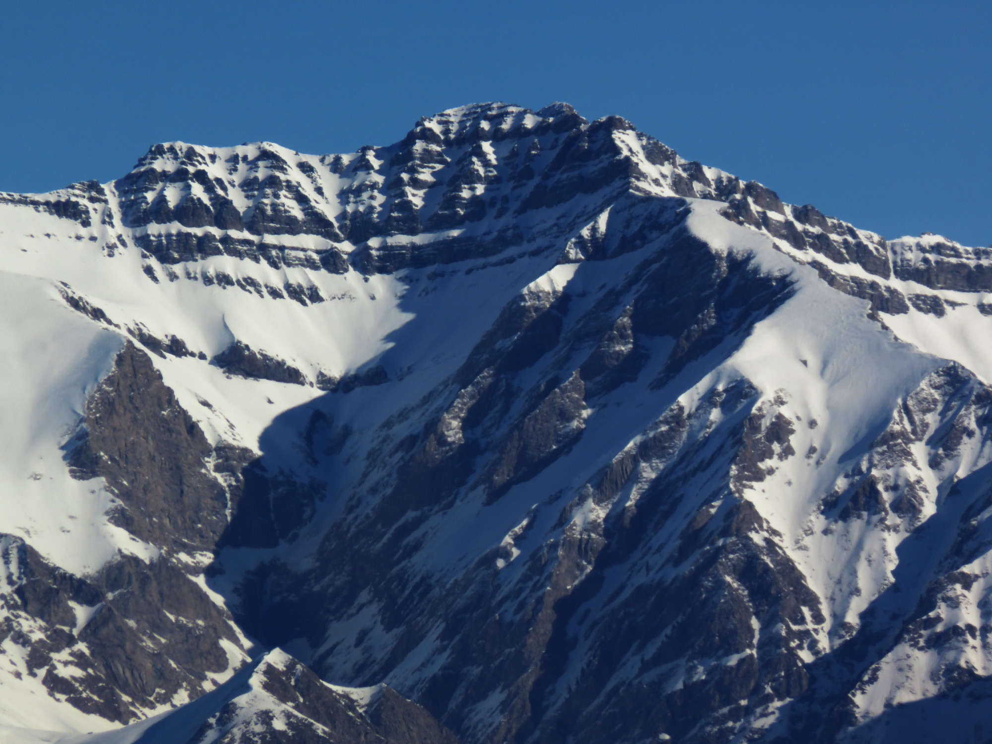 La tête de l'Estrop, dans le massif des Trois Evêchés, au-dessus de Prads-Haute-Bléone